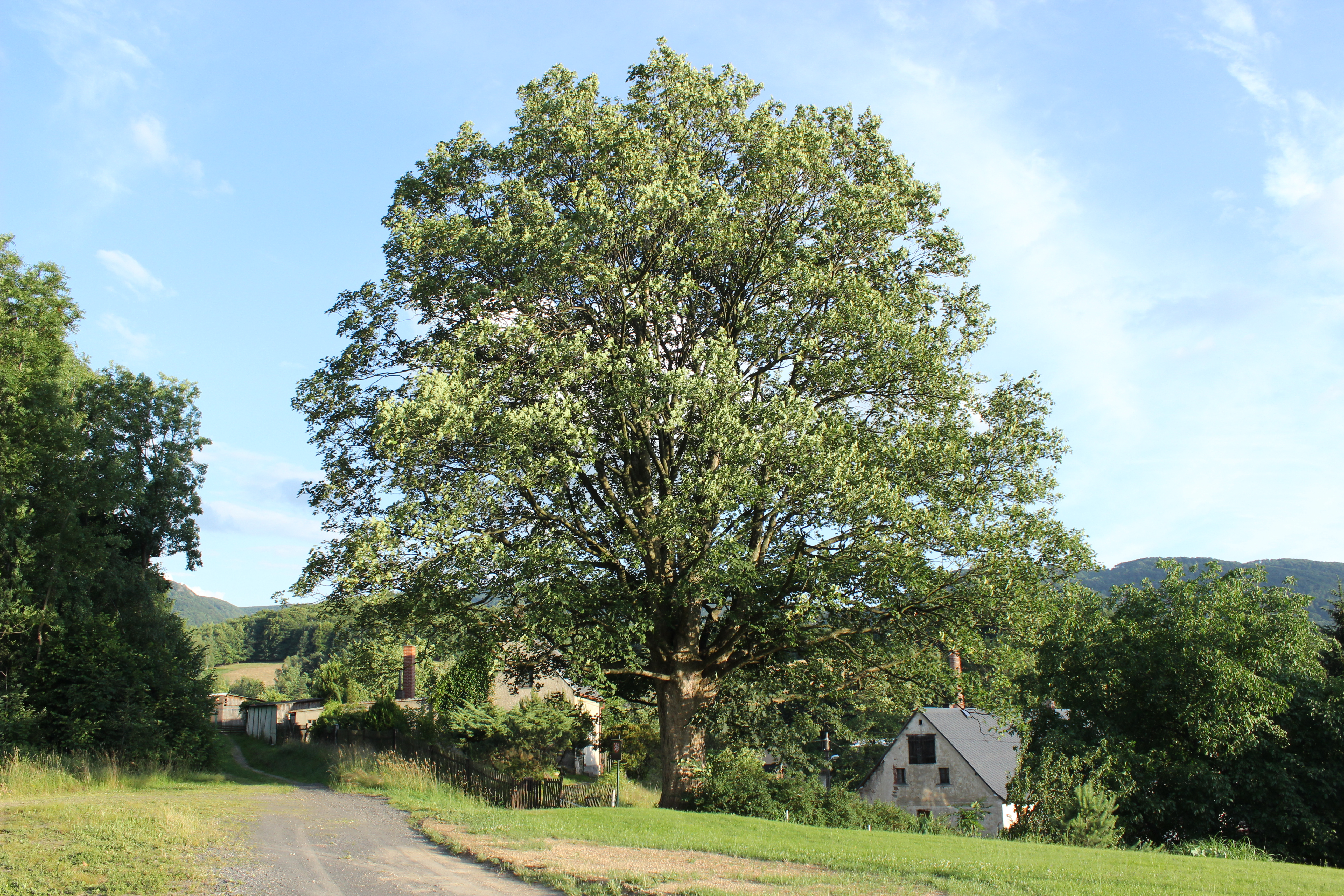 Jedinec památného stromu nazvaného Lužecký klen rostoucí v Lužci, části Raspenavy.